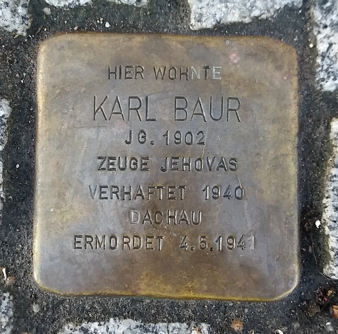 Stolperstein für Karl Baur in Vöhringen (Iller).